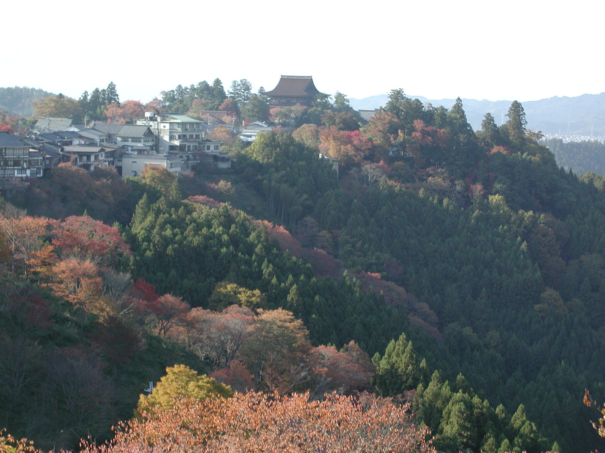 紅葉の吉野山